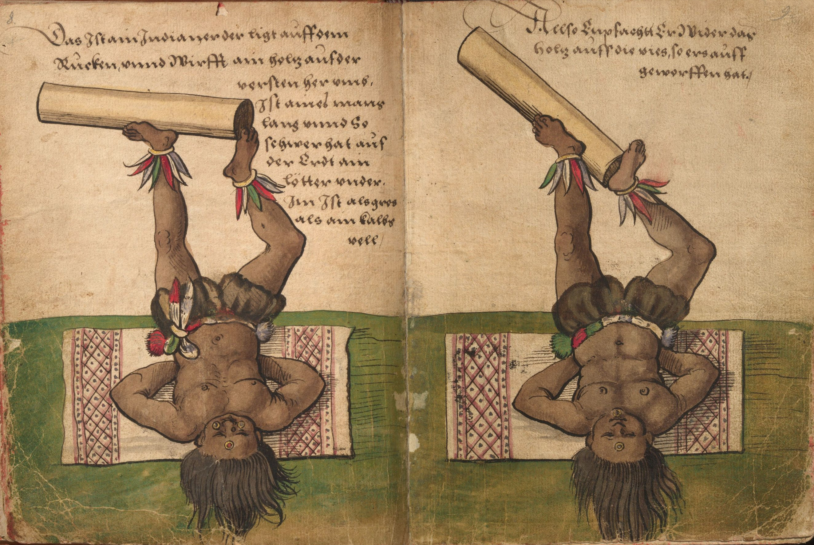 "Trachtenbuch" des Christoph Weiditz, Germanisches Nationalmuseum Nürnberg, Hs. 22474. Bl. 8–9 Indianische Vorführung mit einem Holzklotz (1. Phase) / Indianische Vorführung mit einem Holzklotz (3. Phase)